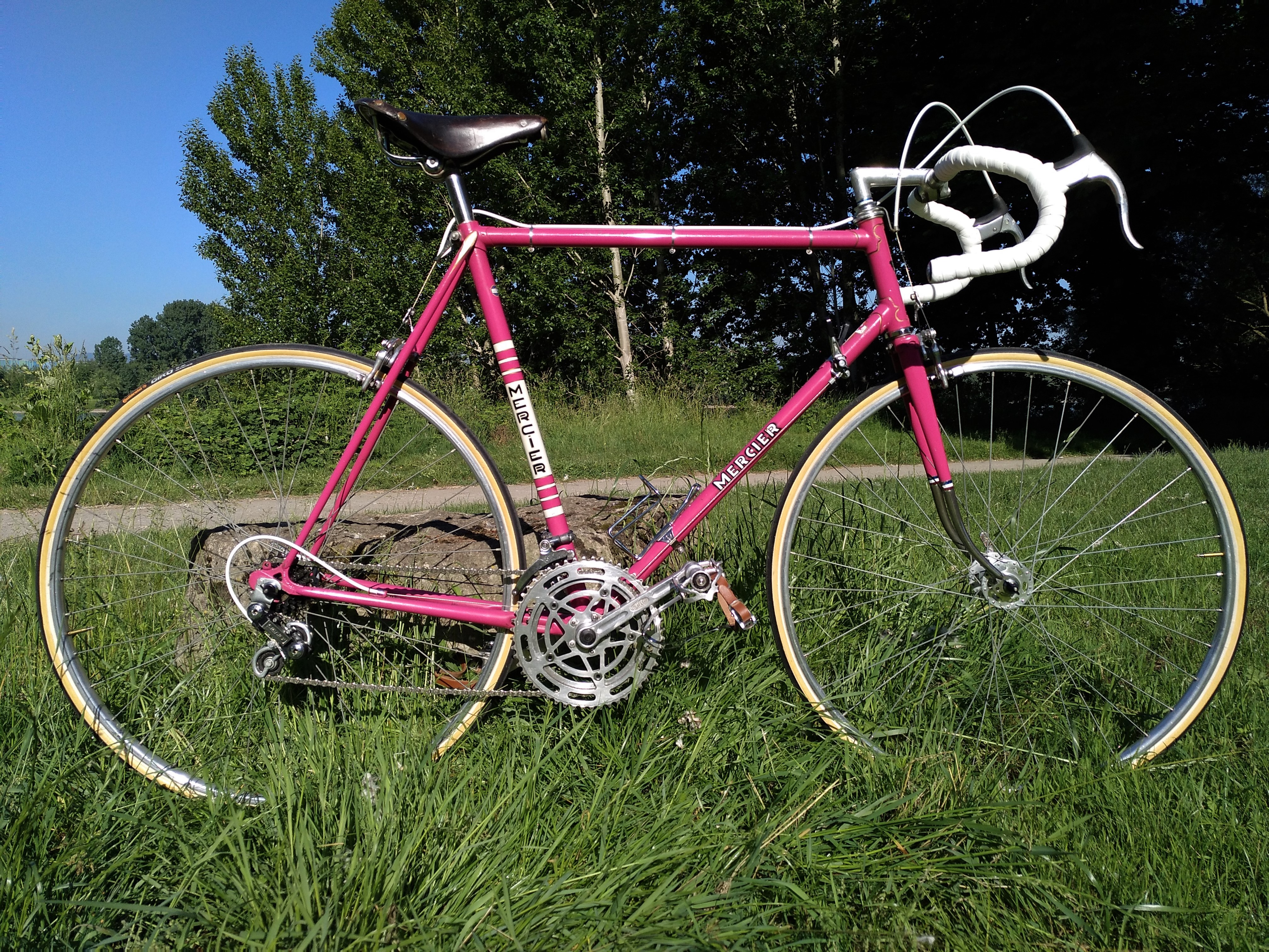 Mercier Fahrrad 1970er Jahre